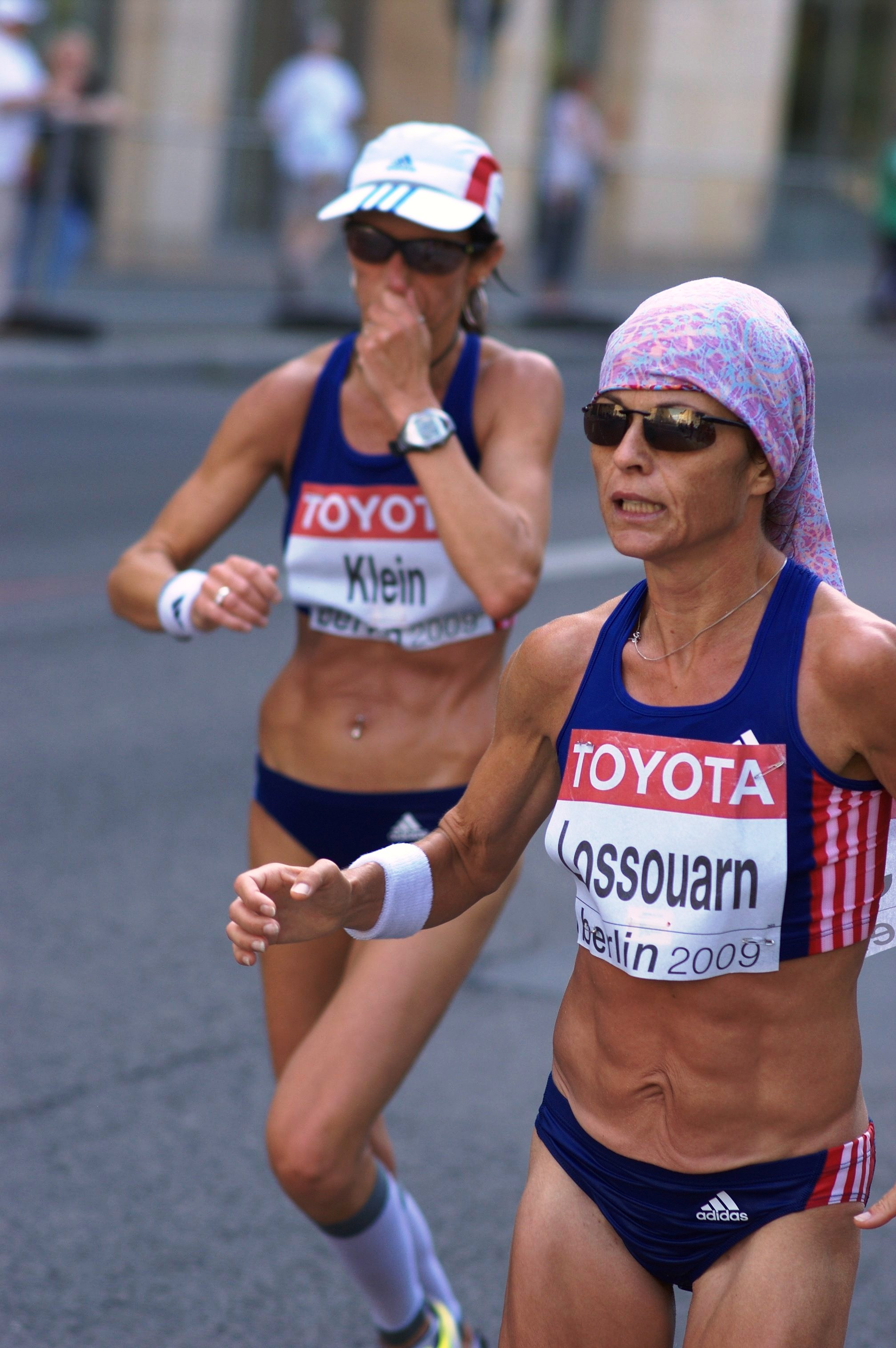 Leichtathletik Weltmeisterschaft Berlin 2009, Frauen-Marathon: Laurence Klein, Patricia Lossouarn